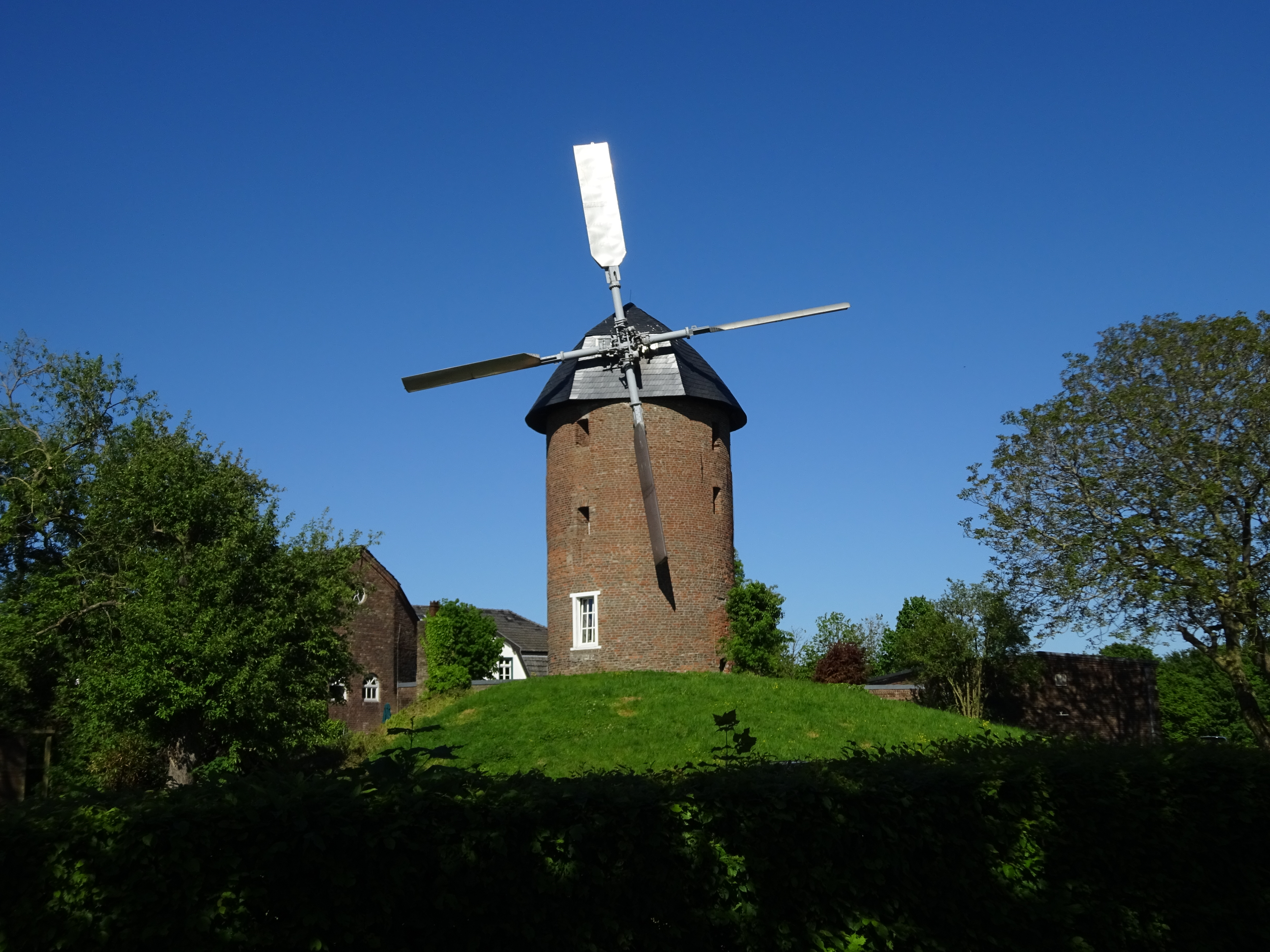 Düffelsmühle, Kalkar, Greilack 34